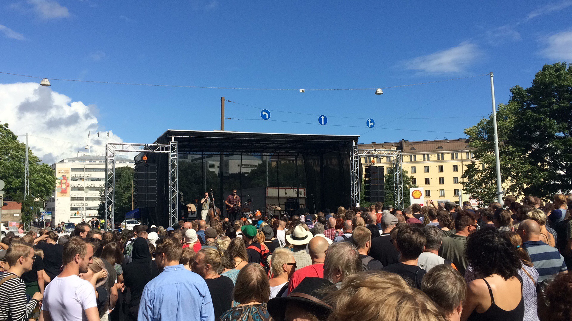 Kallio Block Party 5.8.2017 Sturenkadun ja Porvoonkadun risteyksessä. Lavalla Hurriganes